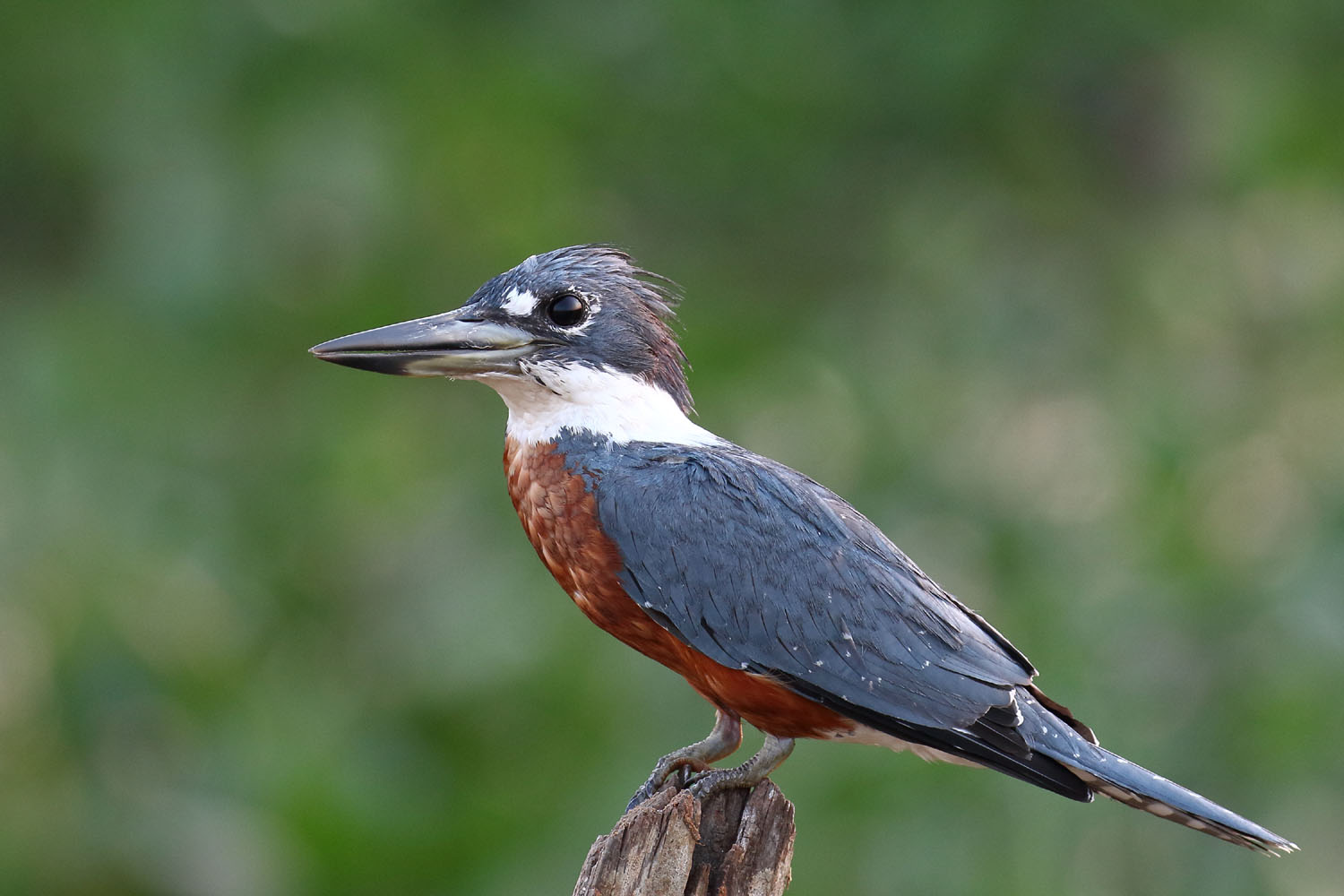 Martin-pêcheur à ventre roux (mâle), Pantanal (Brésil)